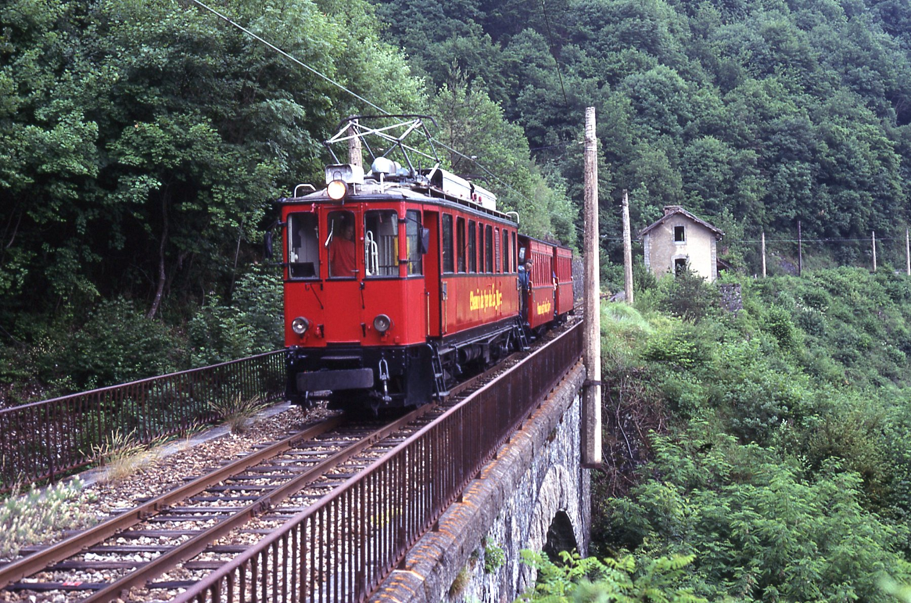 Photo: Trams aux Fils. Motrice et voitures voyageurs du Nyon St.-Cergue, marquées Chemin de fer de la Mure.